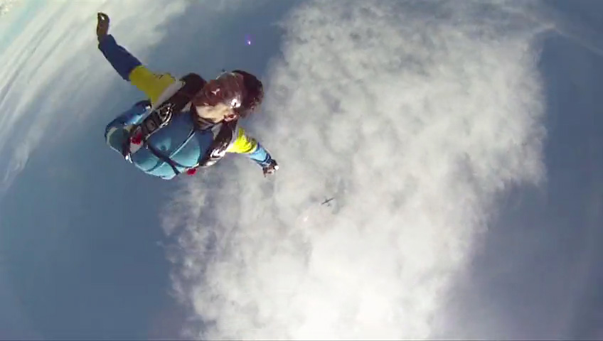 Chute libre Tomer Sysley